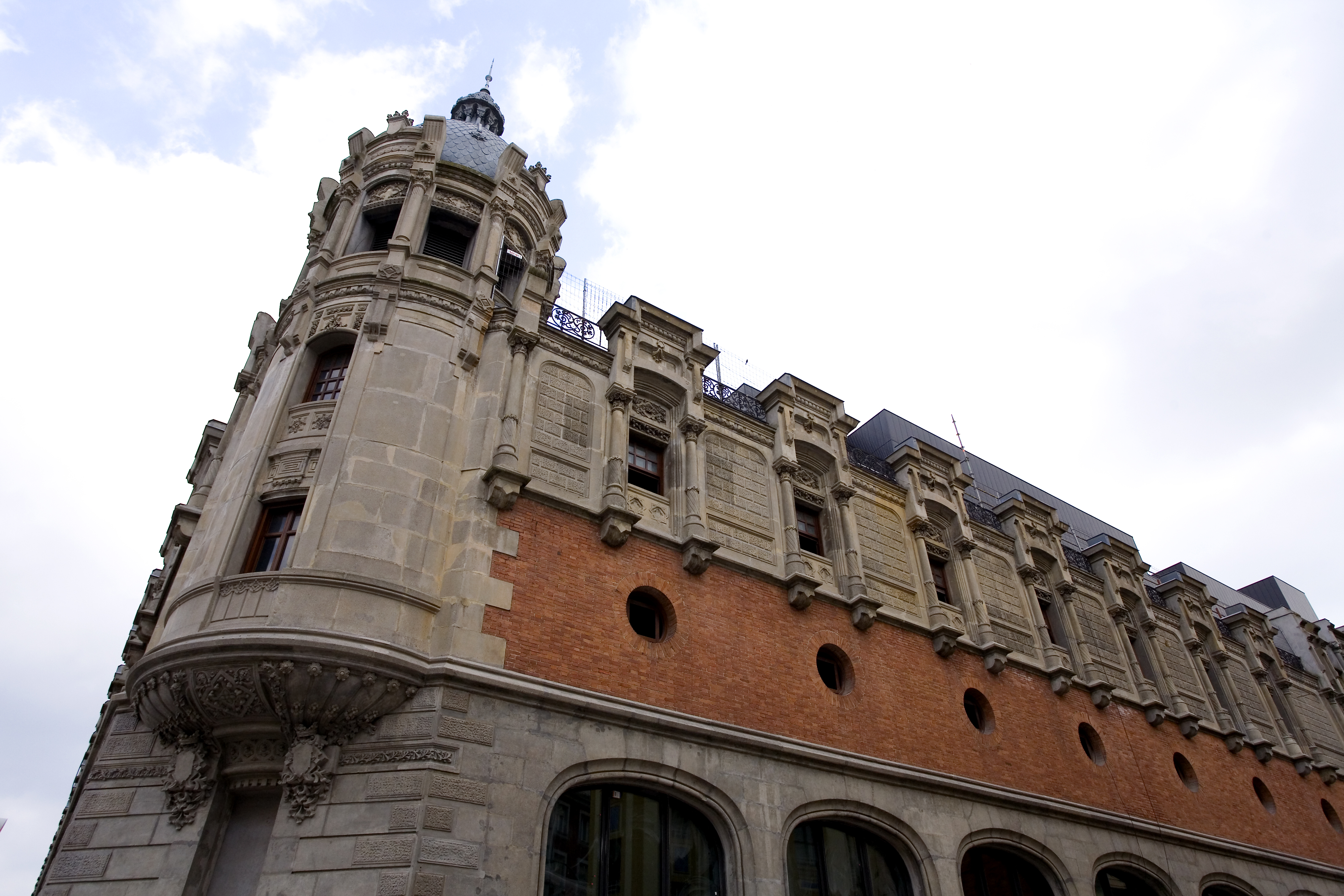 Fachada lateral de AlhóndigaBilbao